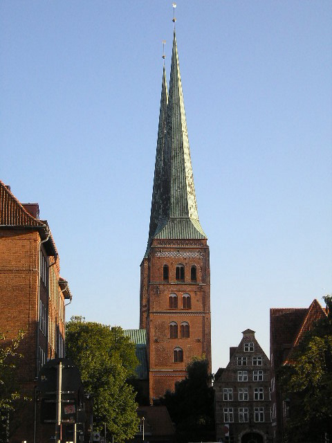 Lübecker Dom